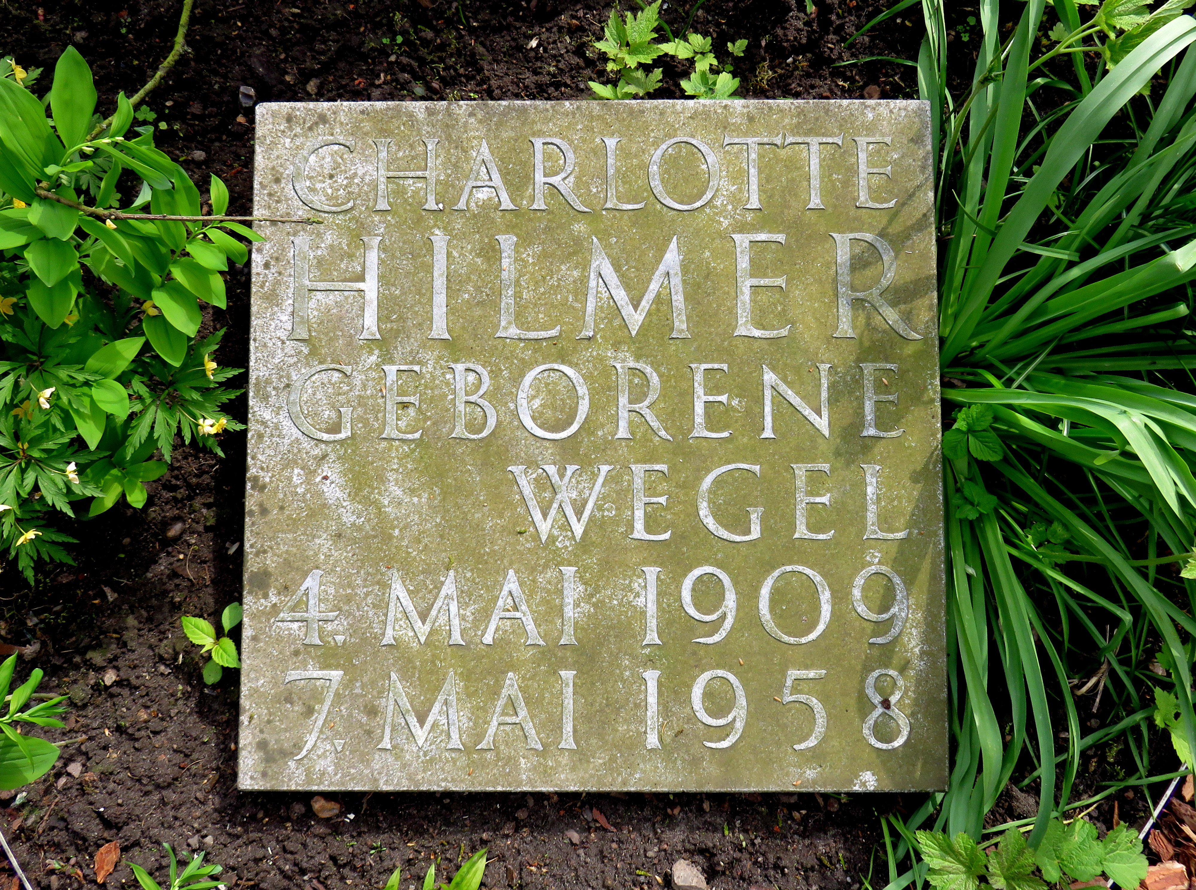 Historischer Grabstein der Kunstmalerin Charlotte Hilmer im Bereich des Gartens der Frauen auf dem Ohlsdorfer Friedhof in Hamburg-Ohlsdorf.